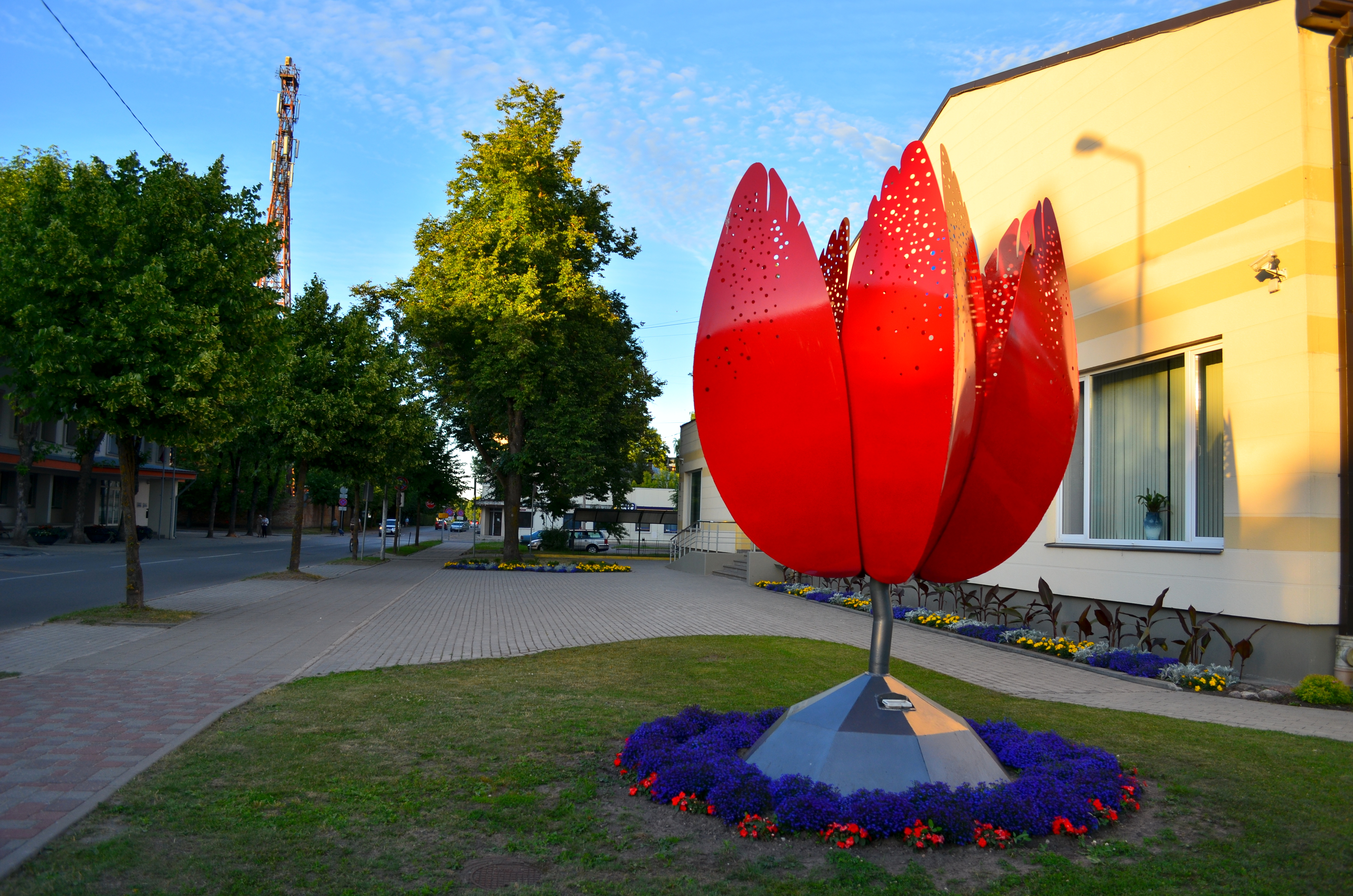 Jelgava